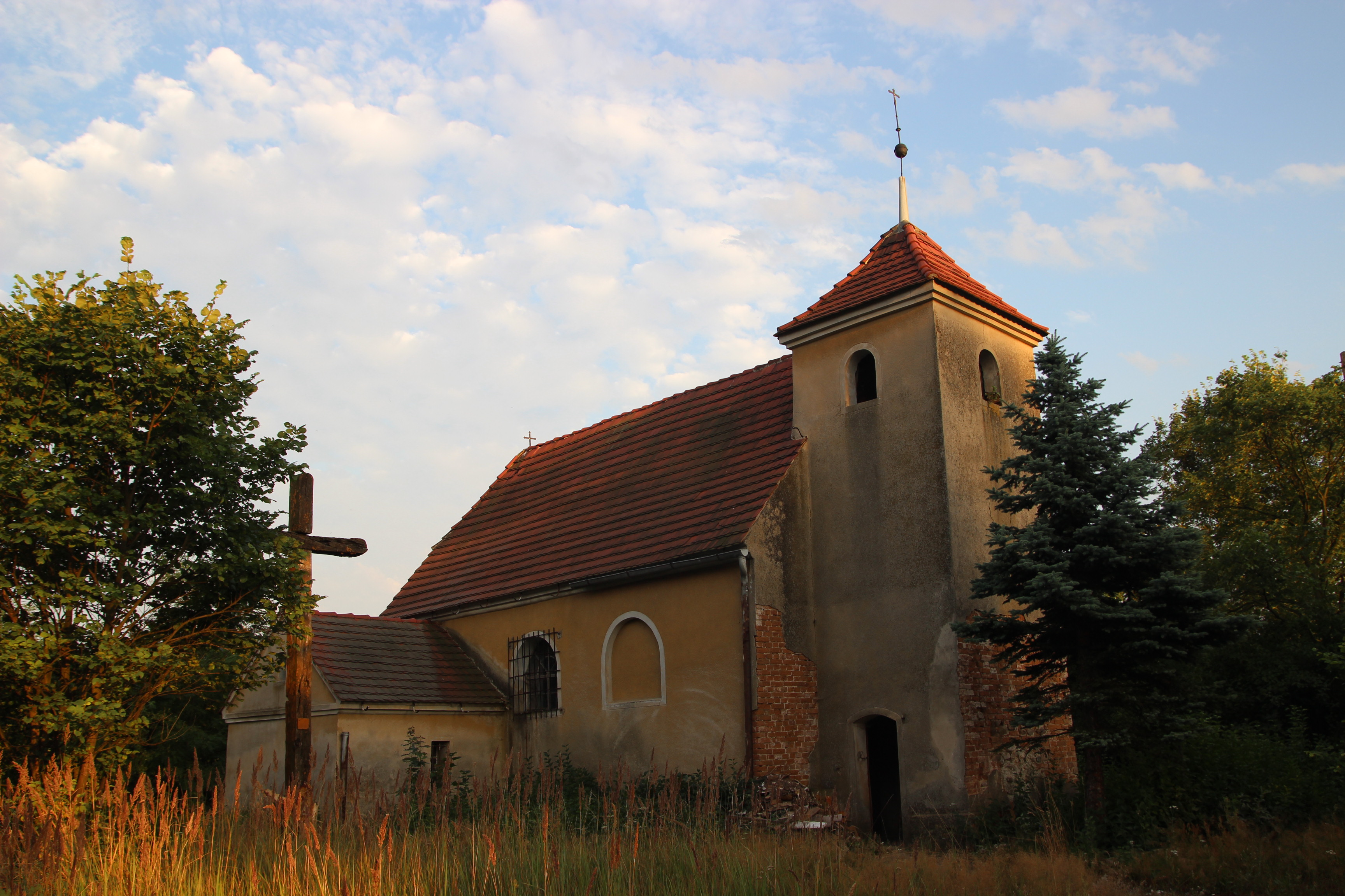 Głogów-Wróblin, zespół kaplicy, 1810